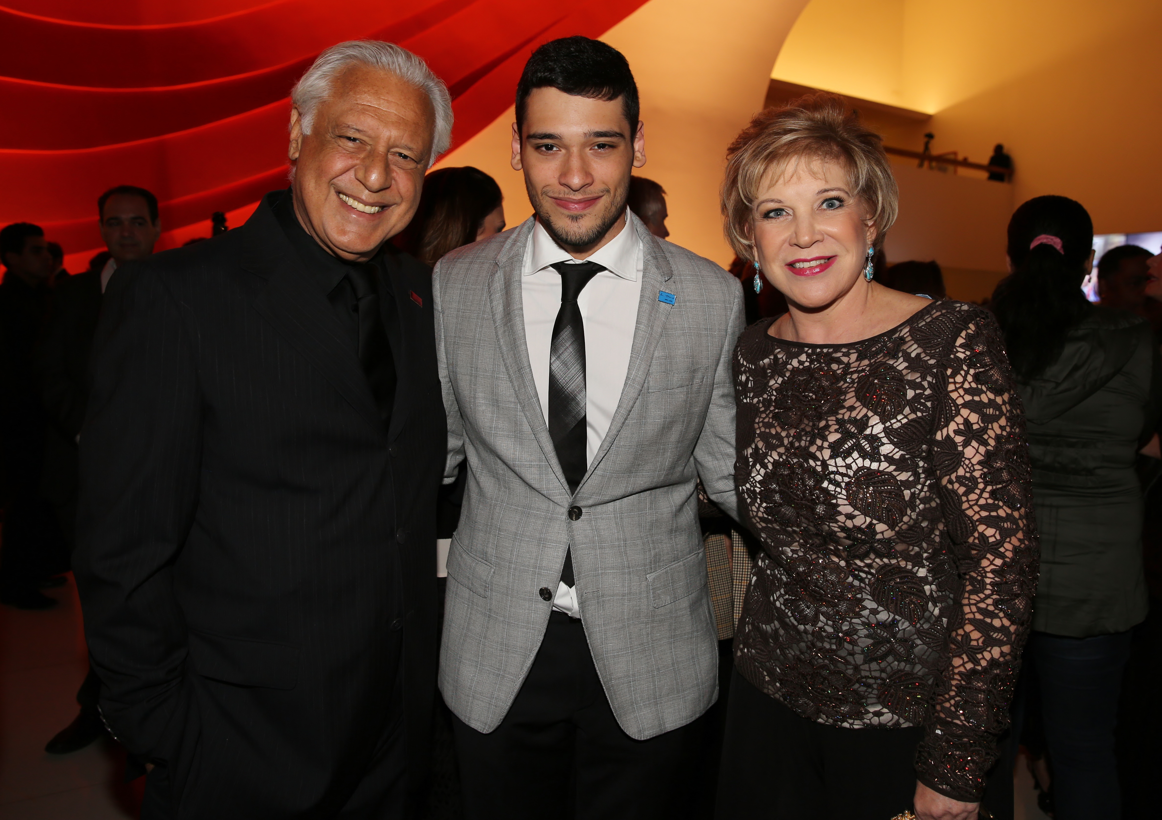 São Paulo (SP) | Ministério da Cultura celebra a Ordem do Mérito Cultural 2013. Na foto: Antônio Fagundes, Bruno Fagundes e a Ministra da Cultura, Marta Suplicy. 05.11.2013 Foto: Elisabete Alves